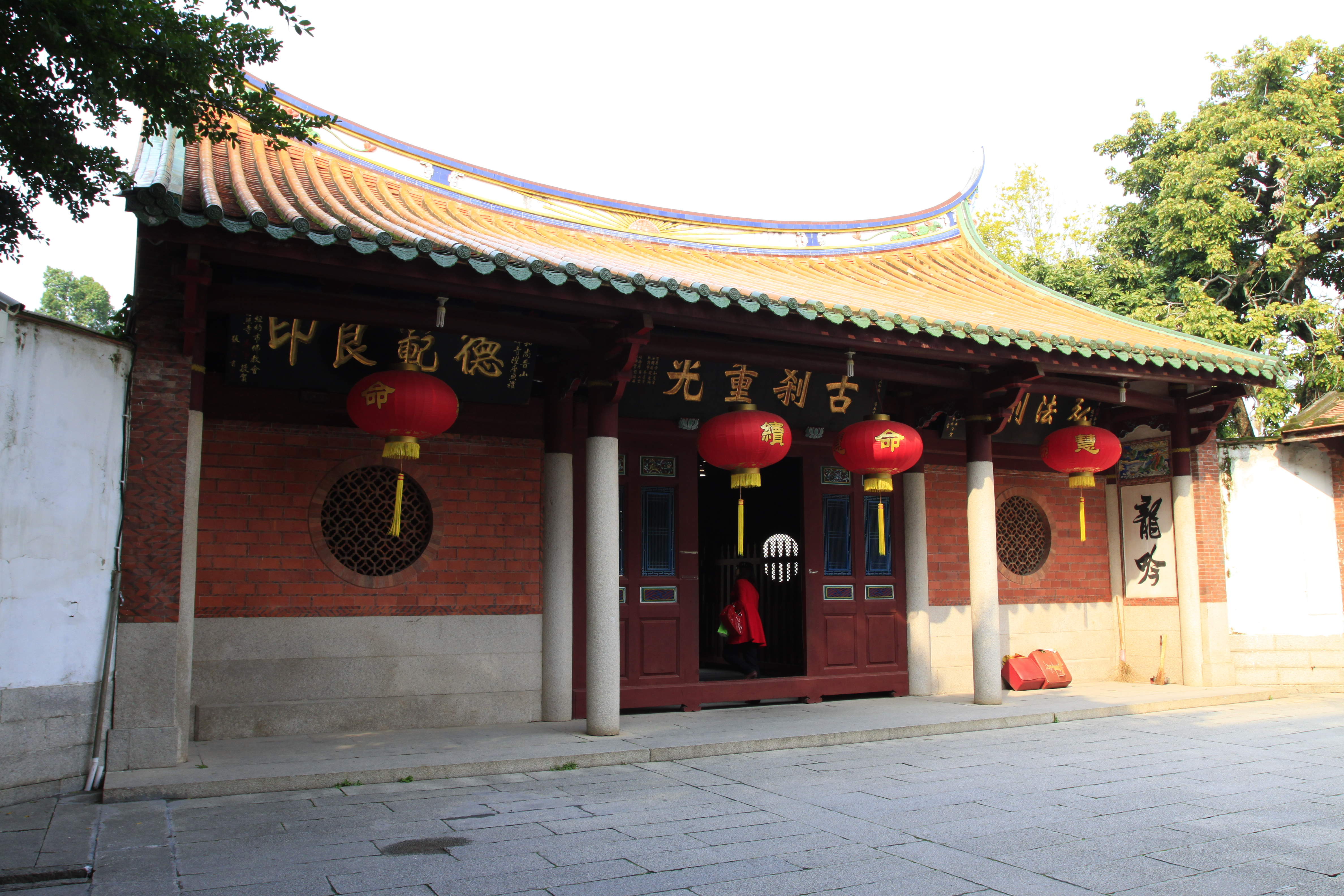 承天寺天王殿，位于中国福建省泉州市，是泉州市文物保护单位。